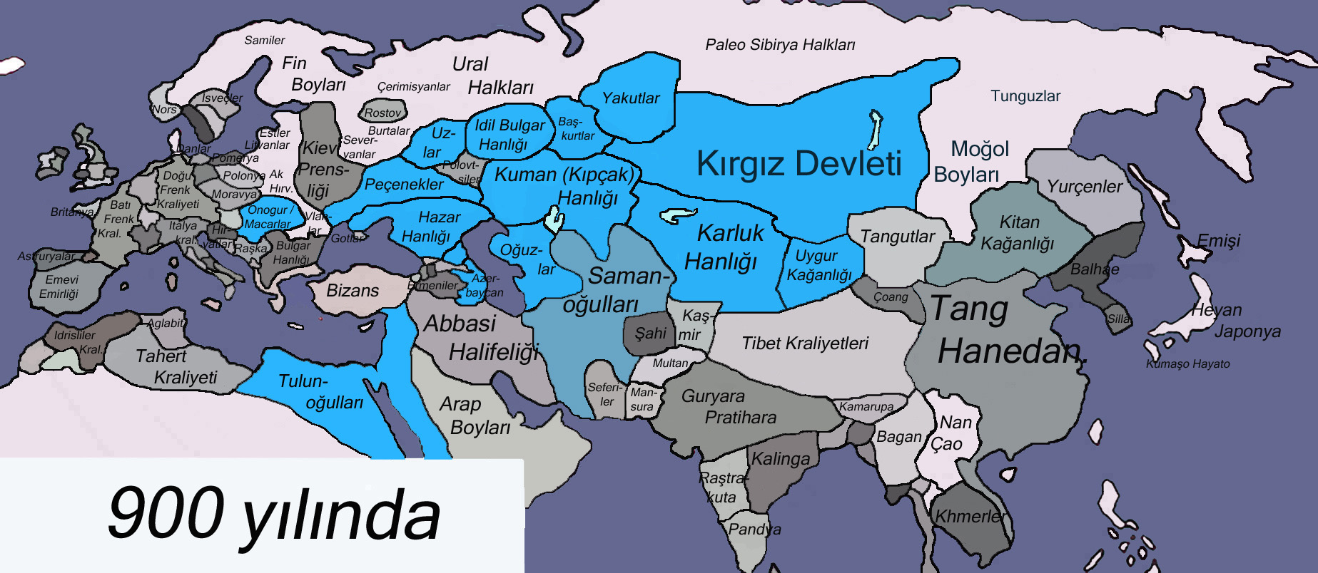 Kaynak: Haritanın büyük bir kısmı Thomas Lessmann'nin izini ile kendi ürettiği Tarihi dünya haritaları'ndan alınmıştır. Ayrıca Jean-Paul Roux'un Türklerin Tarihi (ISBN 975-997-091-0) adlı kitabındaki tariflerine göre ve Büyük Tarih Atlası (Arkın Kitabevi ISBN 975-402-012-4) ile bazı düzeltmeler ve ilaveler yapılmıştır. Kırgız Devleti Almanca Wikipedia'dan tr::de:Kirgisen maddesindeki coğrafi veriler ile eklenmiştir.